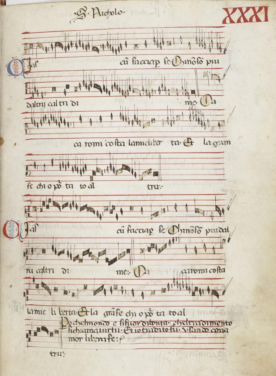 Paris, Bibliothèque Nationale, fonds italien 568